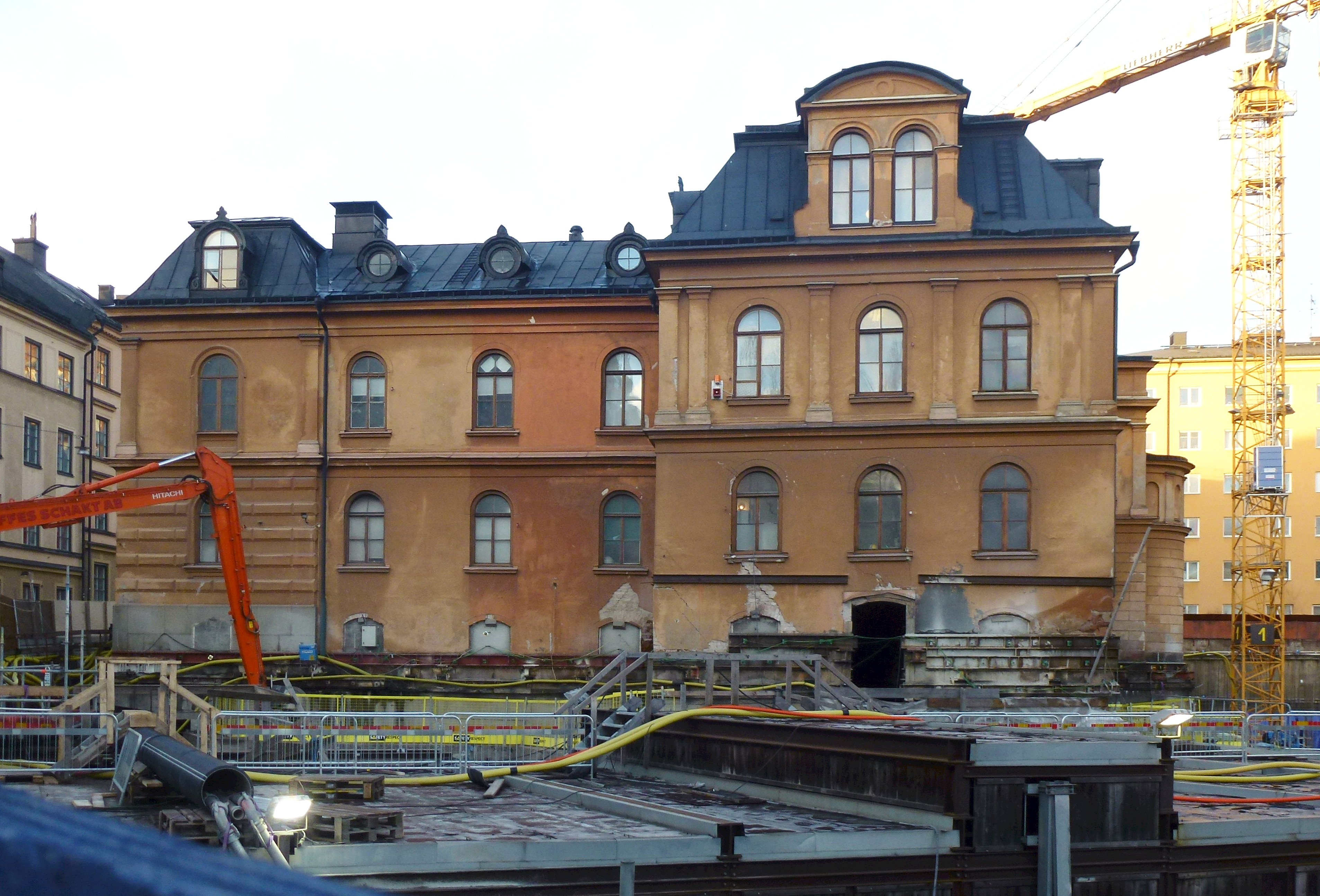 Konung Oscar I:s Minne, fasad mot syd och arbeten för Södermalmstunneln